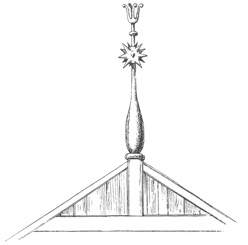 Wendenknüppel aus Teschendorf bei Wittingen. Er besteht aus einem aus Eichenholz geschnitzten Holzpfahl, der motivmäßig in einen Morgenstern übergeht und darüber eine Lilie.